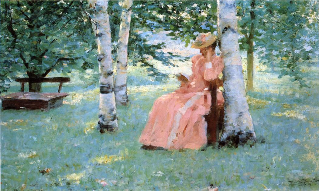 Reverie